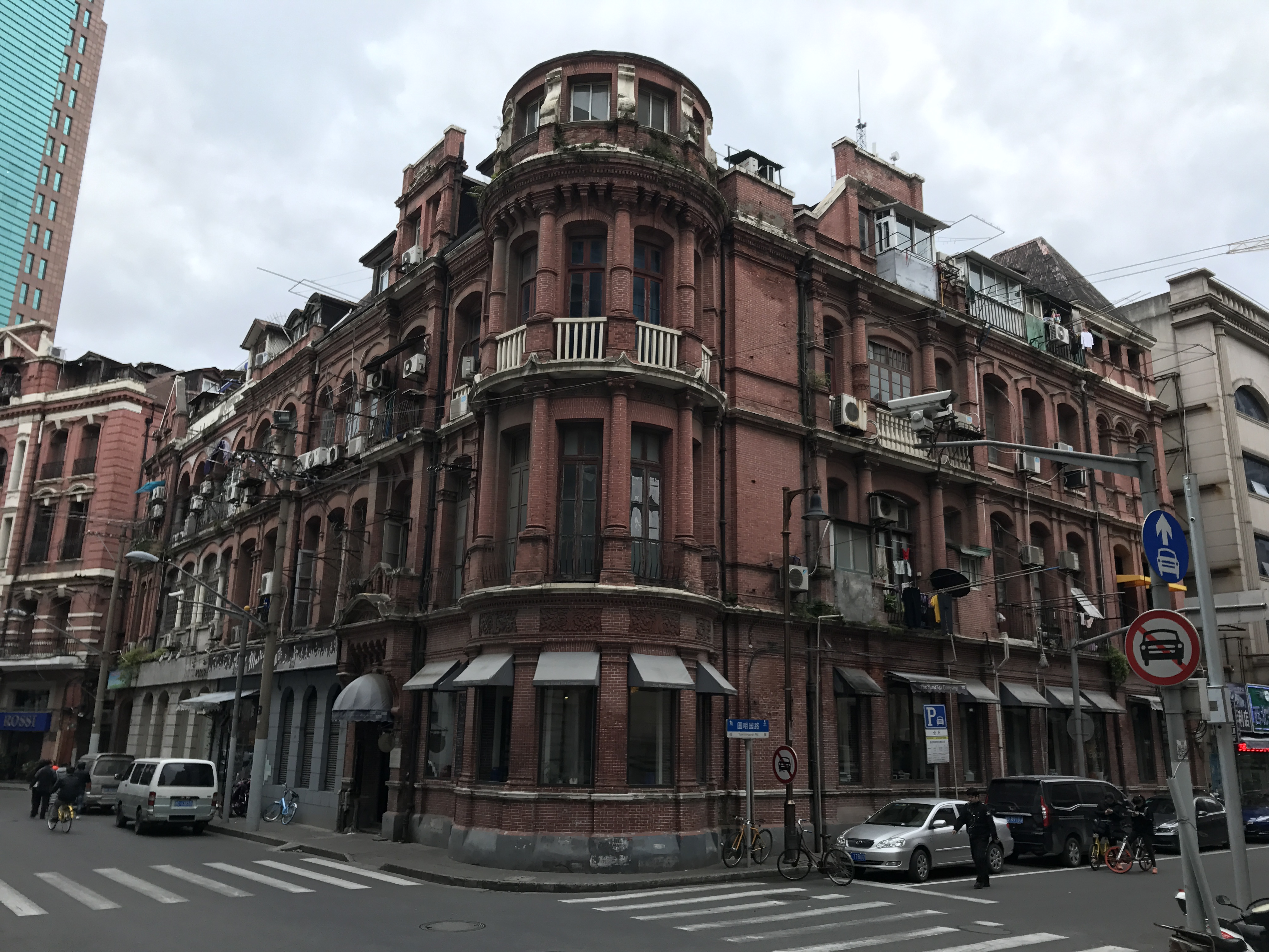 仁记洋行 滇池路100-110号